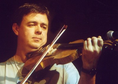 Ronan Pinc en concert à Ploeuc-sur-Lié, festival Zikablok, 2002. Source : photo prise par Utilisateur:Littlefocus avec accord du sujet